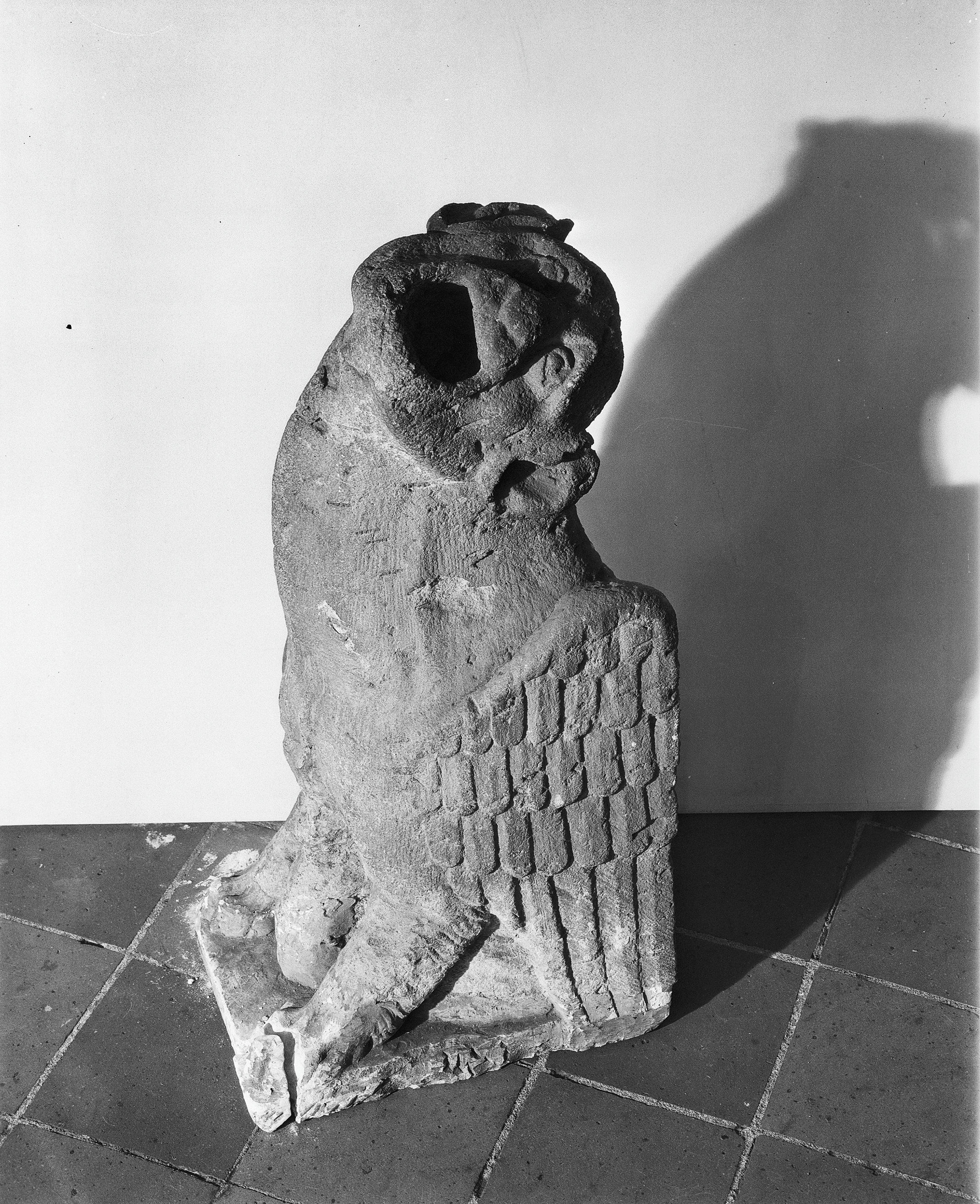 Sint Janskathedraal: spuwer thans in provinciaal Museum den Bosch